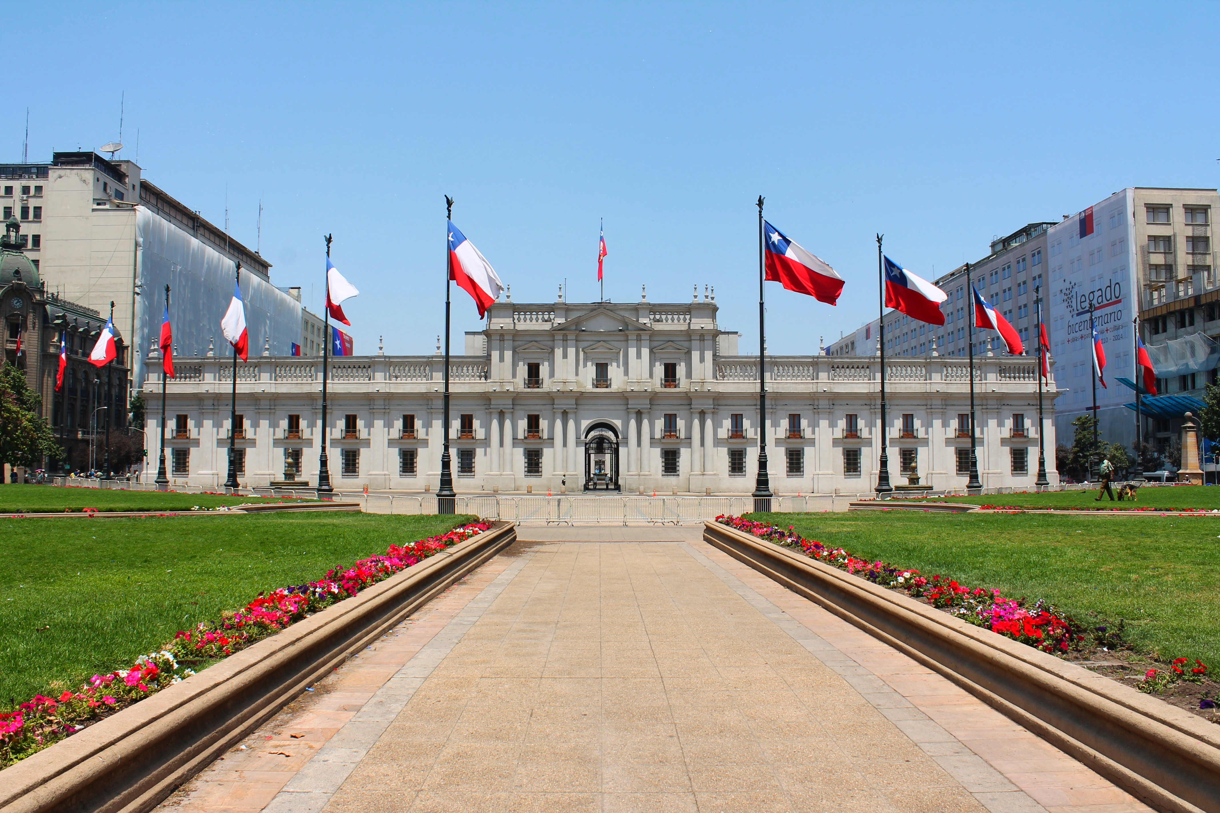 La Moneda